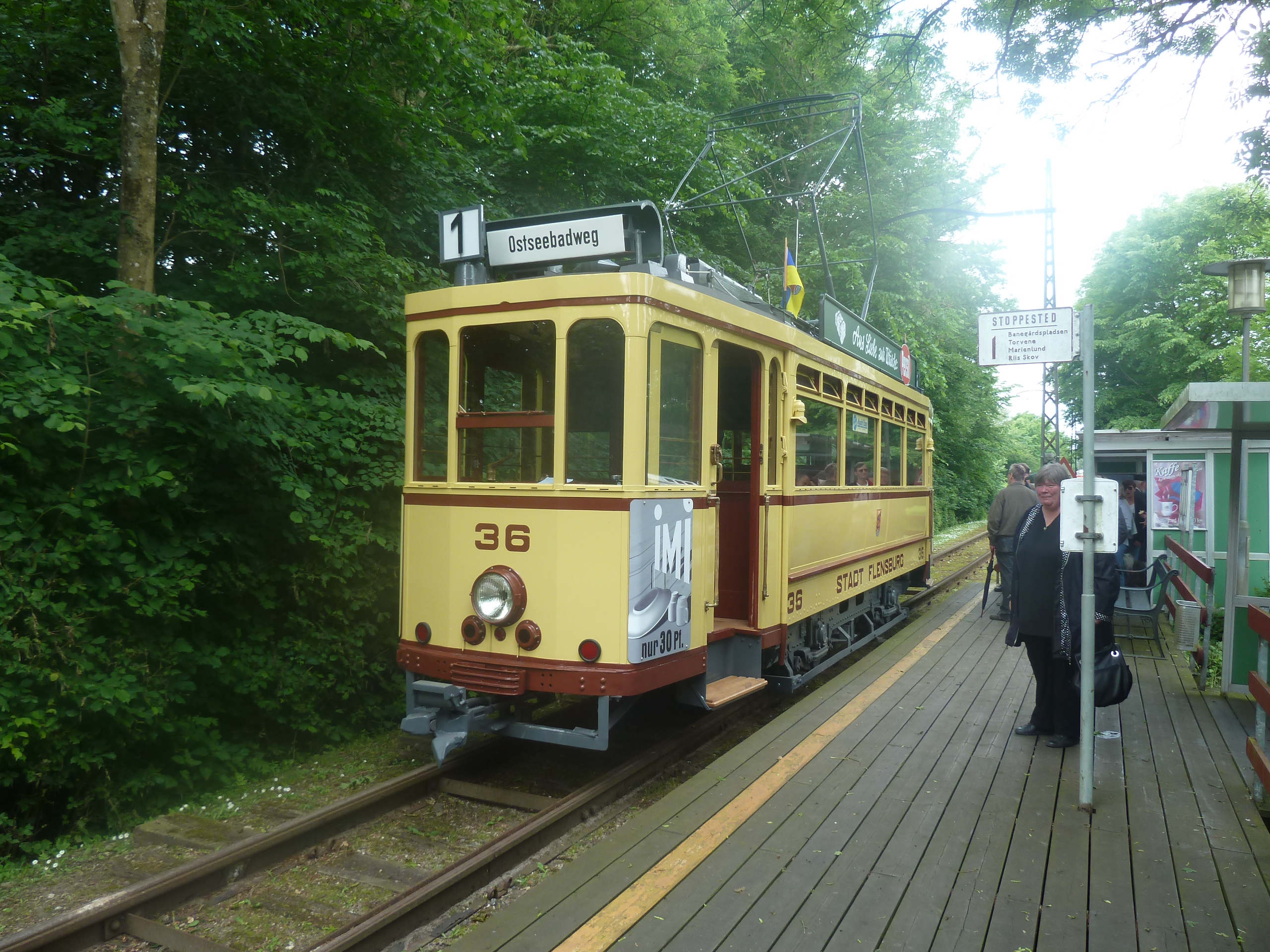 Old tram from Flensburg, SFV 36, now on Sporvejsmuseet Skjoldenæsholm in Denmark.